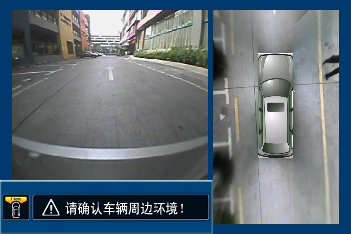 全景泊车系统俯视图